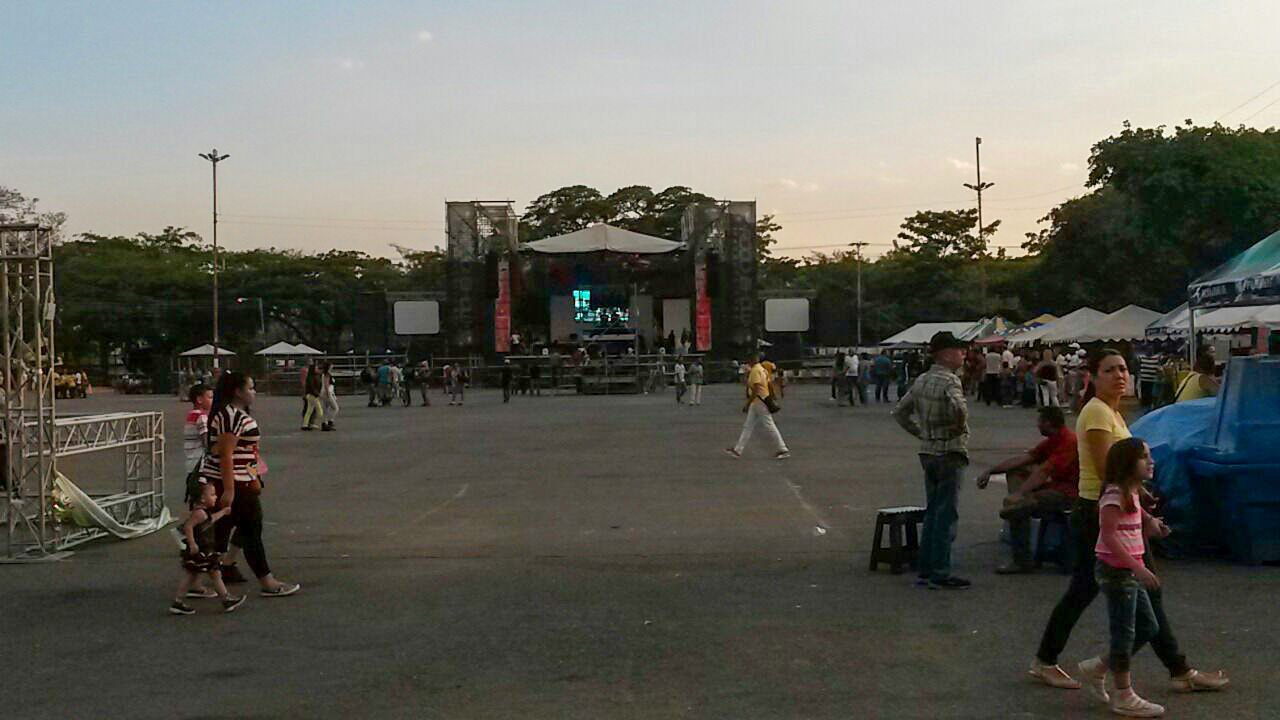 estacionamiento del parque de ferias de san jacinto